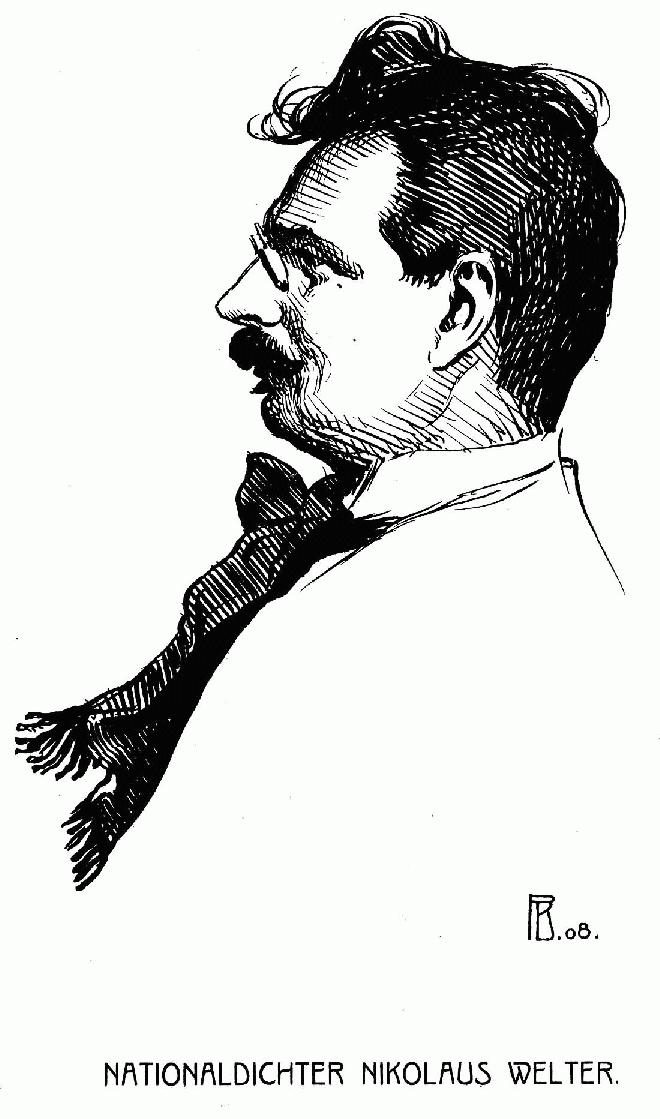 Den Nikolaus Welter (Zeechnung vum Pierre Blanc)